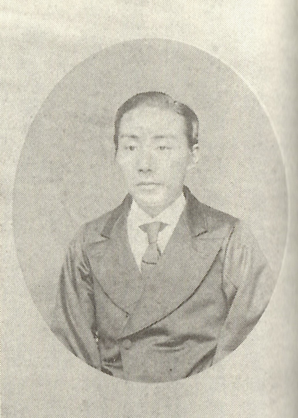 今園国映の肖像写真。